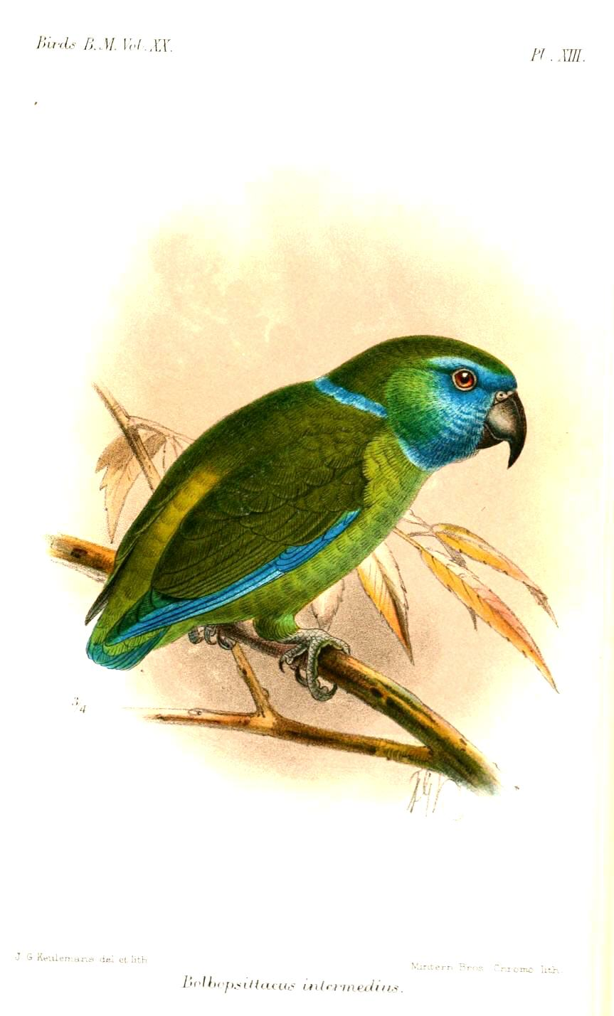 Bolbopsittacus intermedius = Bolbopsittacus lunulatus intermedius, Guaiabero ssp.